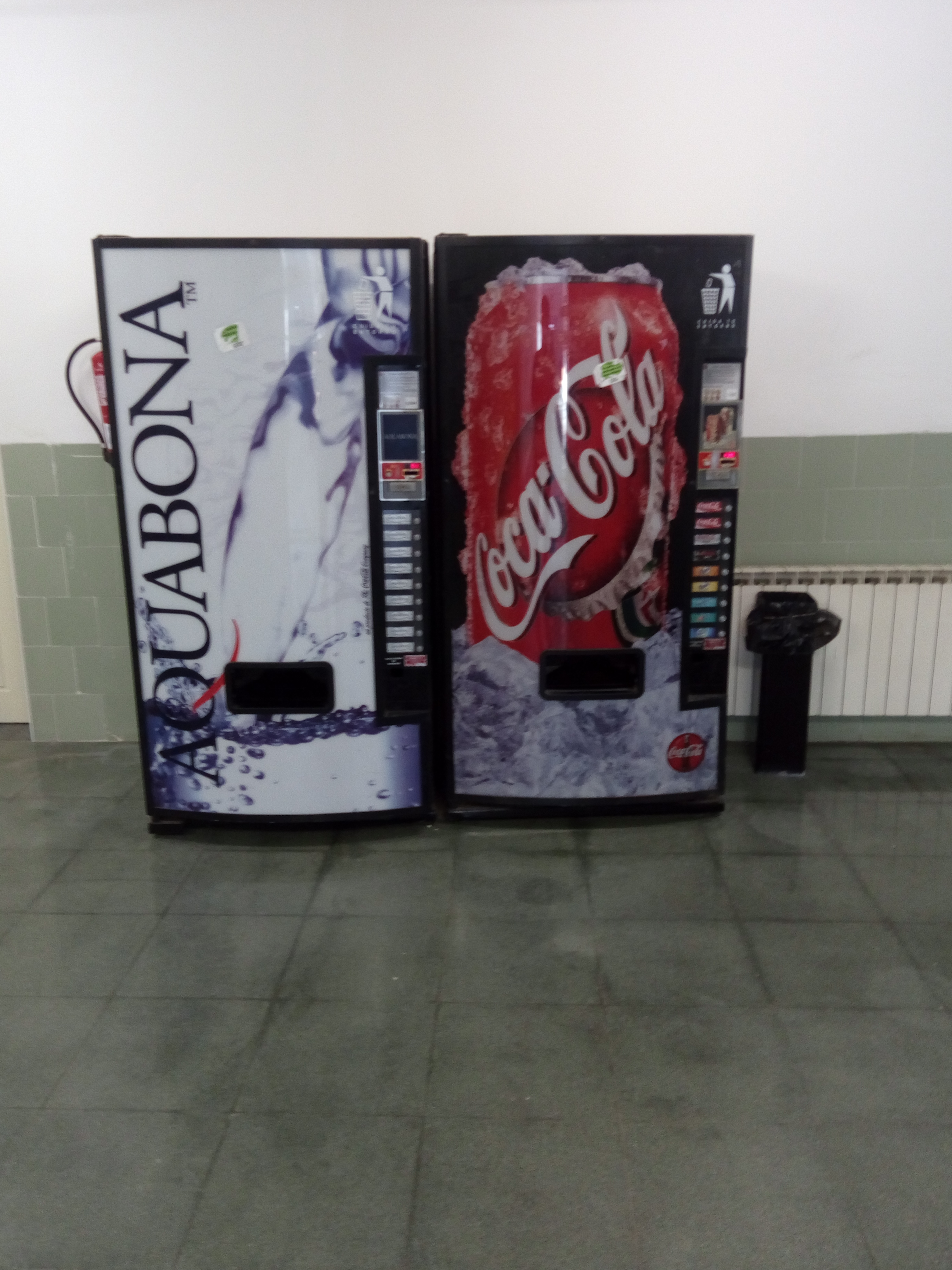 Dispensadores del aulario de agua y bebidas gaseosas.